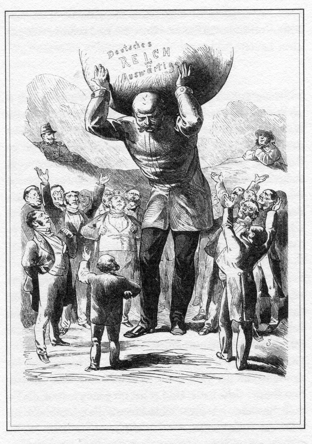 Бисмарк-атлант. В честь его 60-летия. Надпись: "Германская империя и заграница"